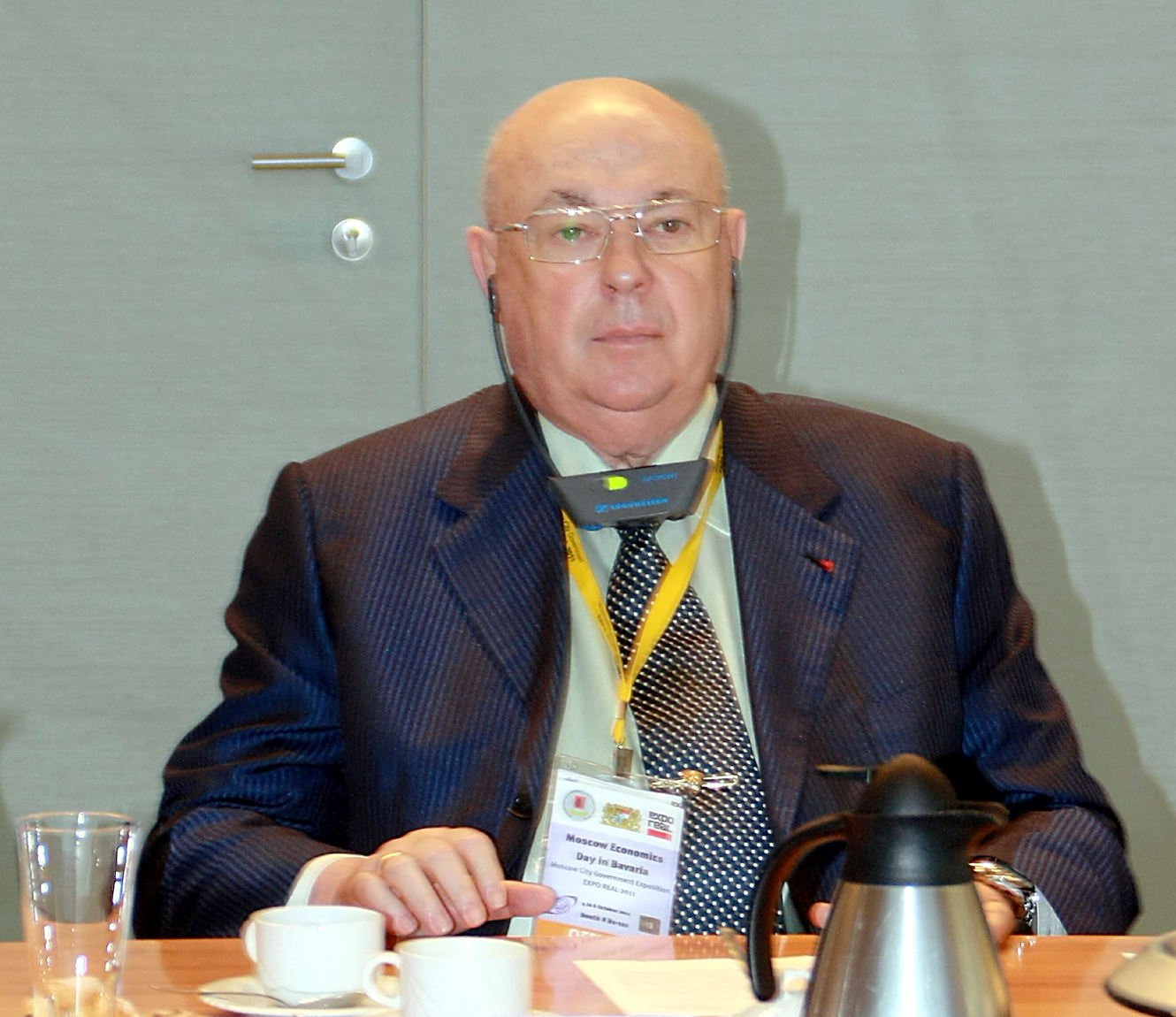 Wladimir Iossifowitsch Ressin (russisch Влади́мир Ио́сифович Ре́син; wiss. Transliteration Vladimir Iosifovič Resin), russischer Politiker, zur Zeit (Nov. 2011) 1. stellv. Bürgermeister von Moskau.